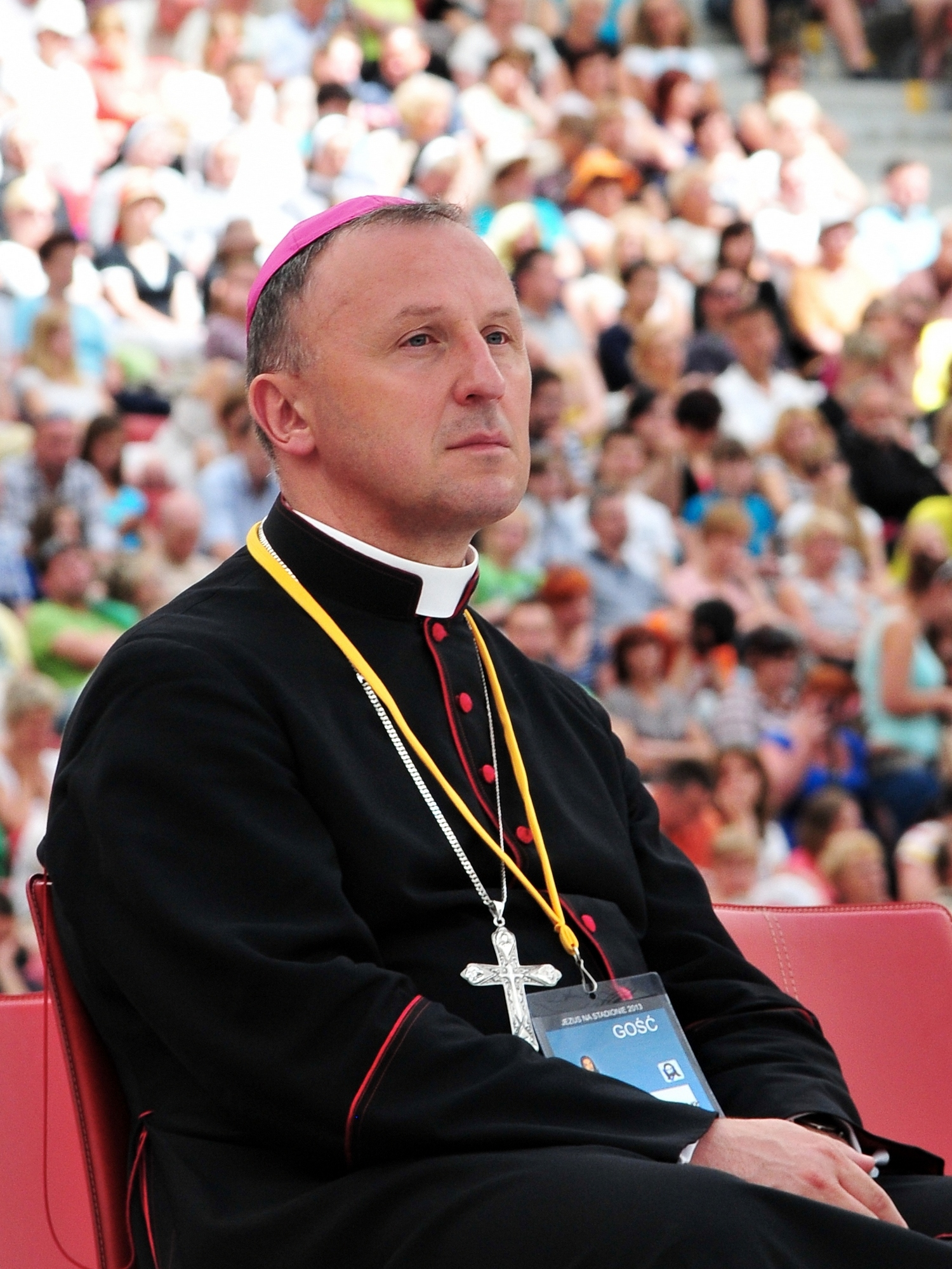 Marek Solarczyk (ur. 13 kwietnia 1967 w Wołominie) – polski biskup rzymskokatolicki, doktor teologii, specjalista w zakresie historii Kościoła, biskup pomocniczy warszawsko-praski od 2011. Zdjęcie wykonane podczas spotkania rekolekcyjnego "Jezus na Stadionie", Stadion Narodowy w Warszawie, 6 lipca 2013.